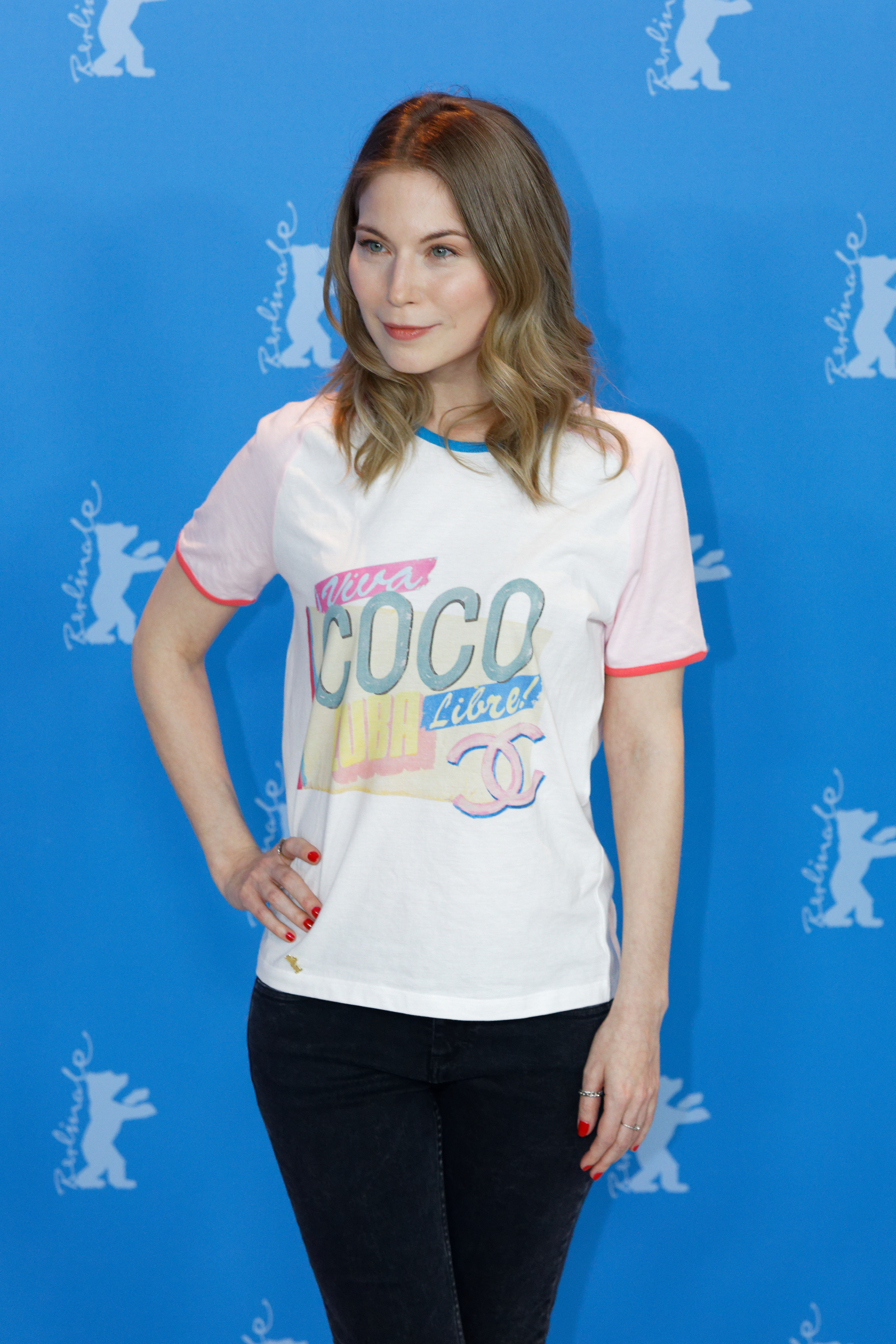 Nora Waldstätten beim Photo Call zu Wilde Maus bei der Berlinale 2017